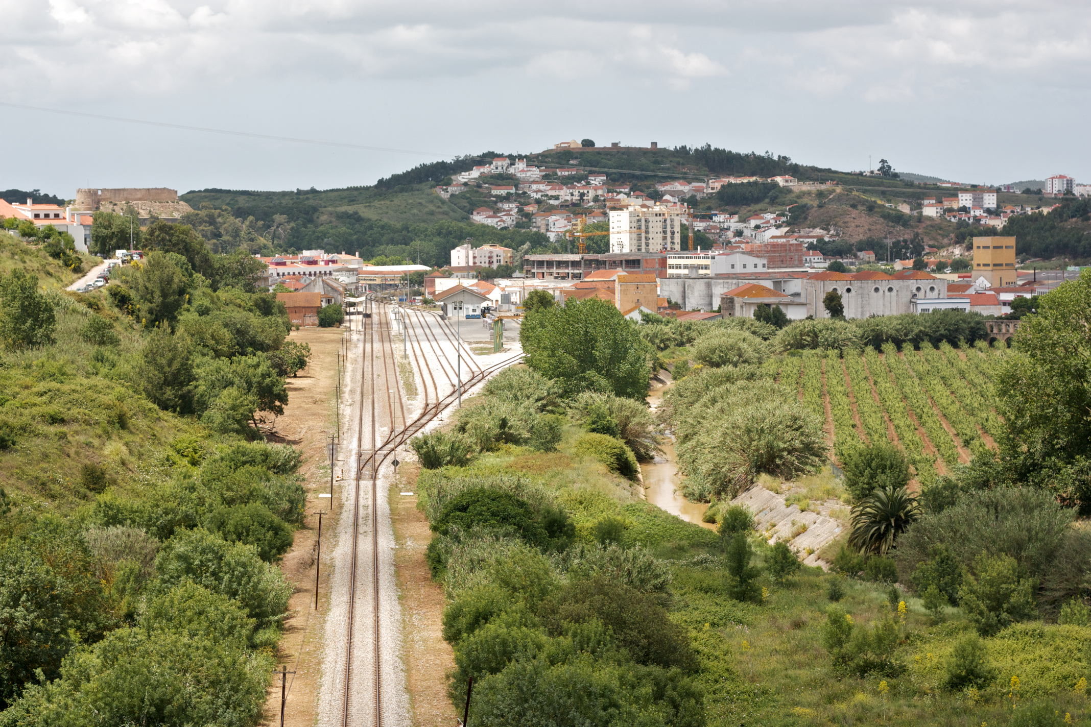 Tipo: E Estação Local: Torres Vedras [Linha do Oeste, PK 64] Data e hora: 19 de Maio de 2011 [13h37]